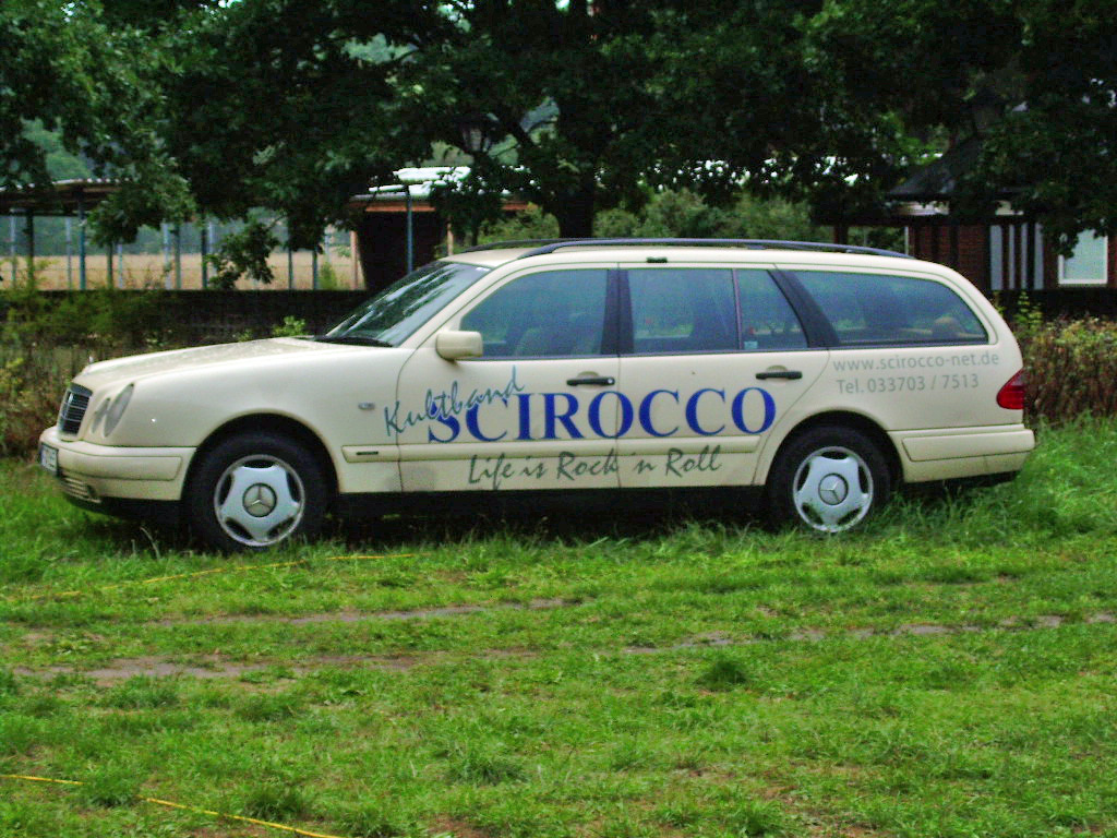 Tourwagen